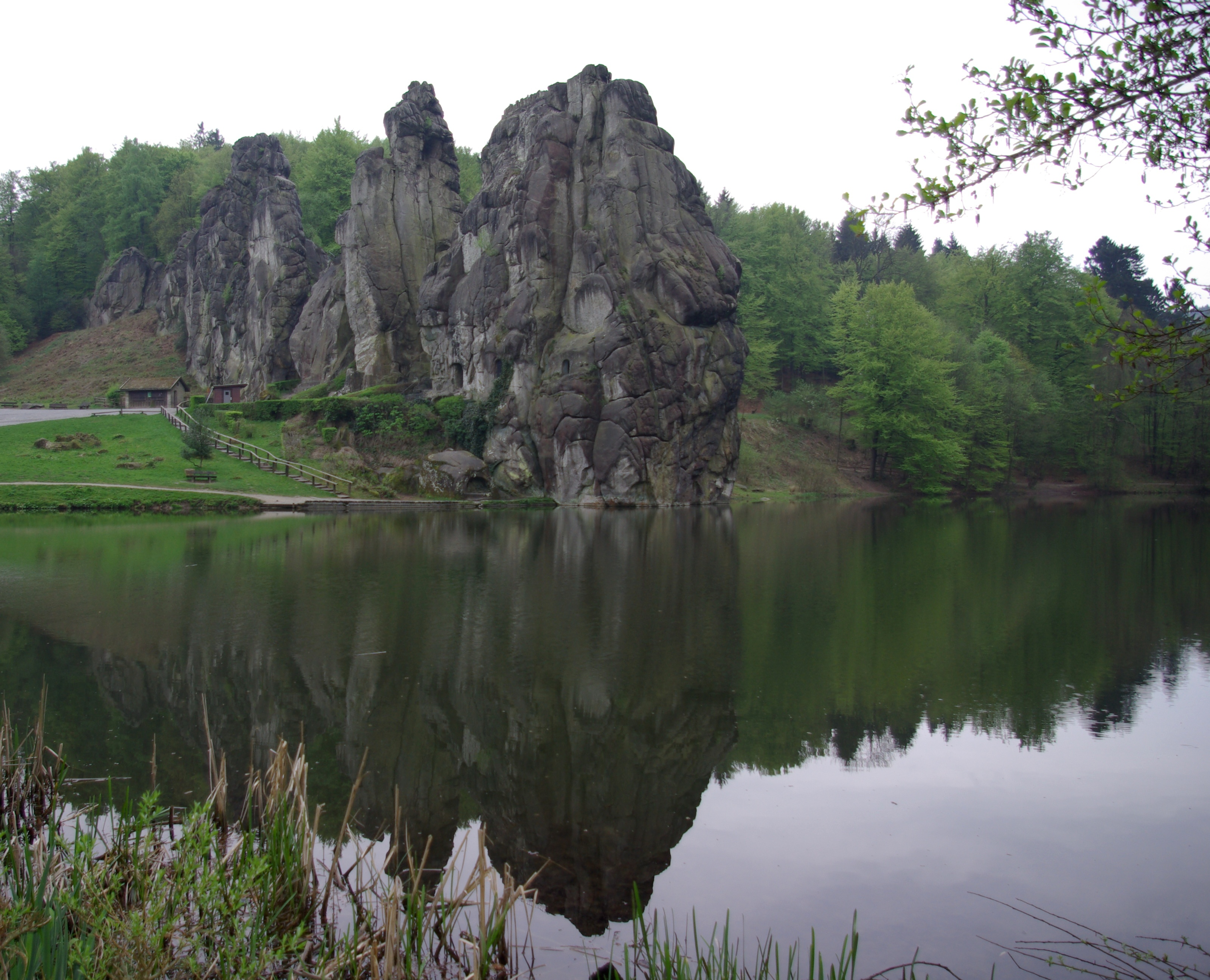 Externsteine mit dem Wiembecke-Teich